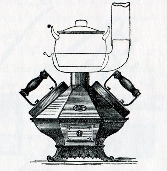 Bolinders strtykugn